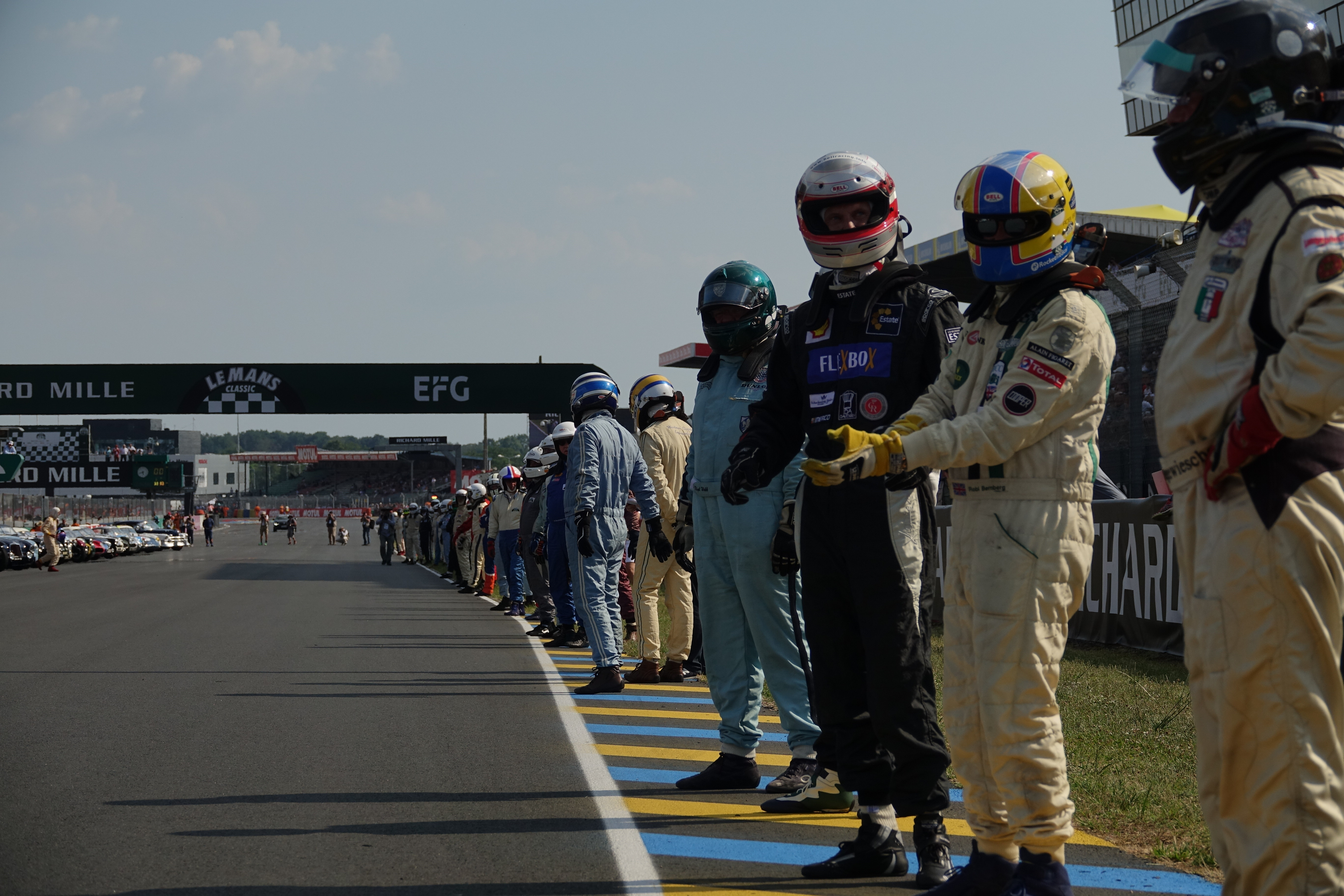 Le Mans Classic 2018